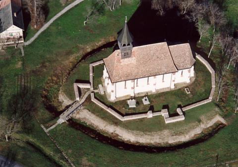 Óföldeák, Hungary, aerialphotography